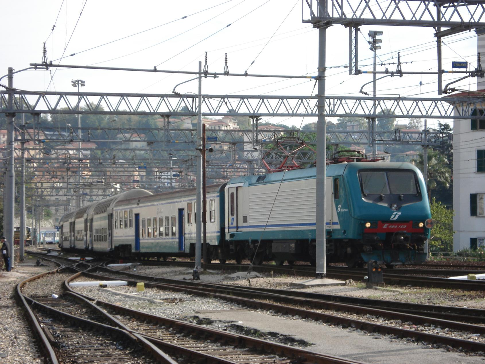 La Spezia Centrale - La Spezia- Italy